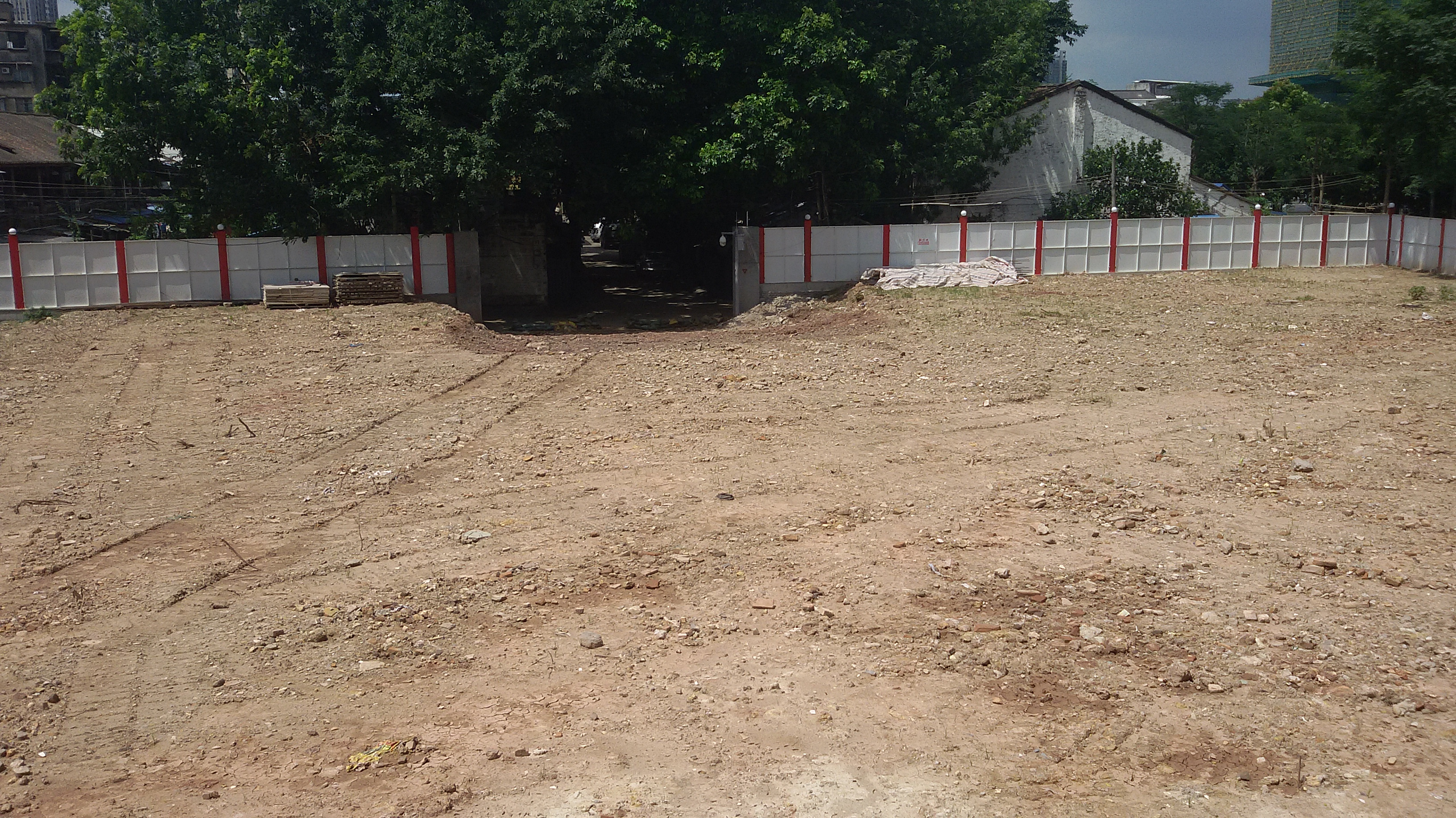 粵語: 2017年6月26號，廣州地鐵11號綫石圍塘站嘅工地。